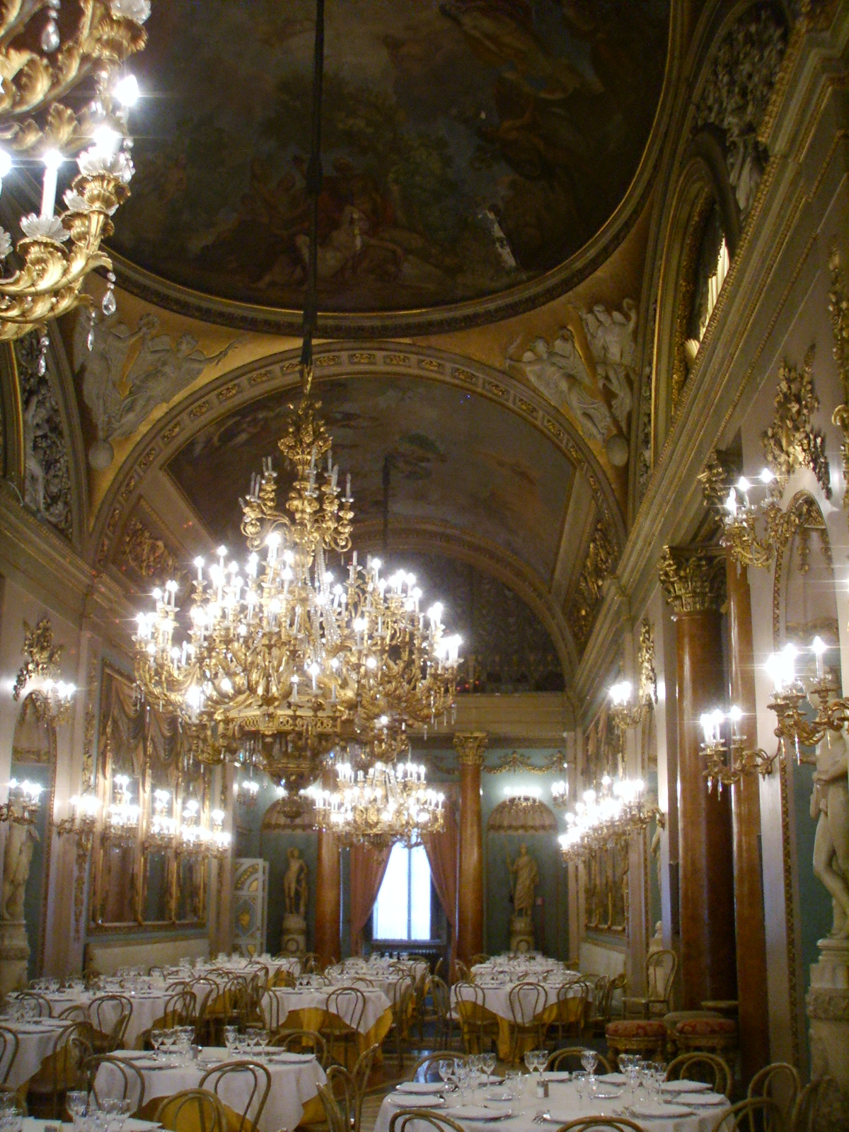 Palazzo borghese, galleria monumentale